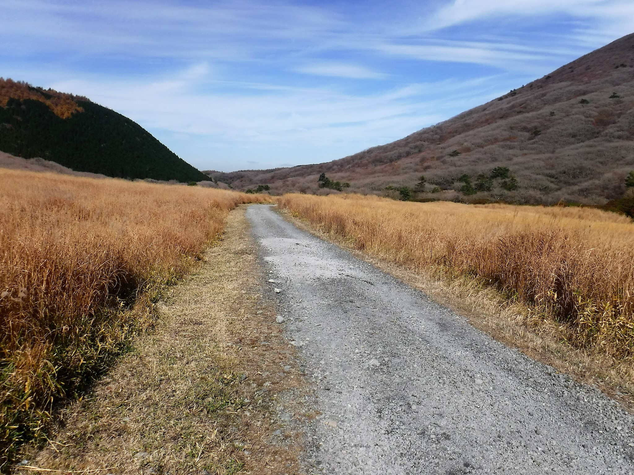 坊がつる。北側より